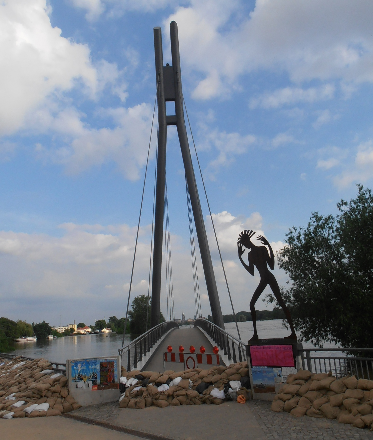 Die Molenbrücke in Dresden-Pieschen während des Hochwassers in Mitteleuropa 2013; Blick von Norden